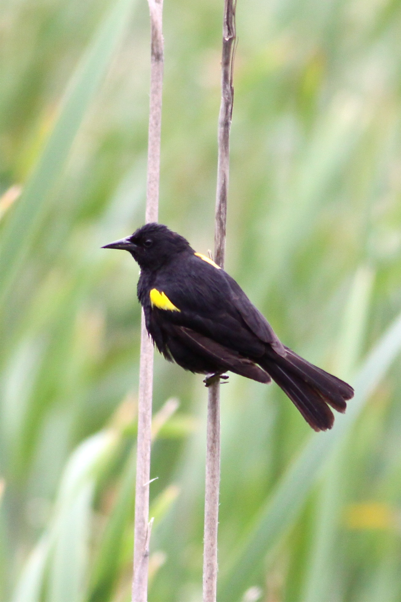 Costanera Sur Nature Reserve, Buenos Aires, Argentina